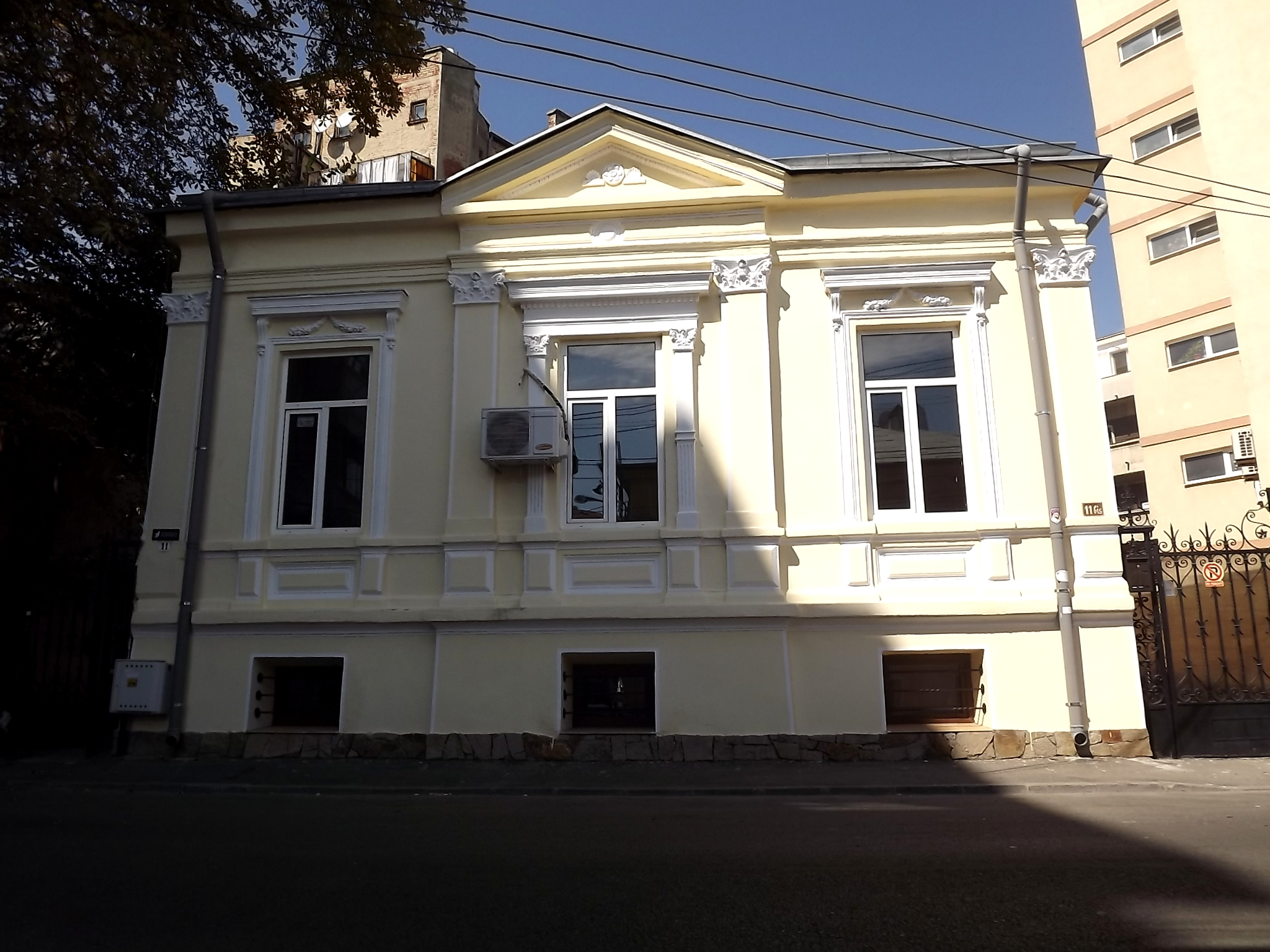 Casăde